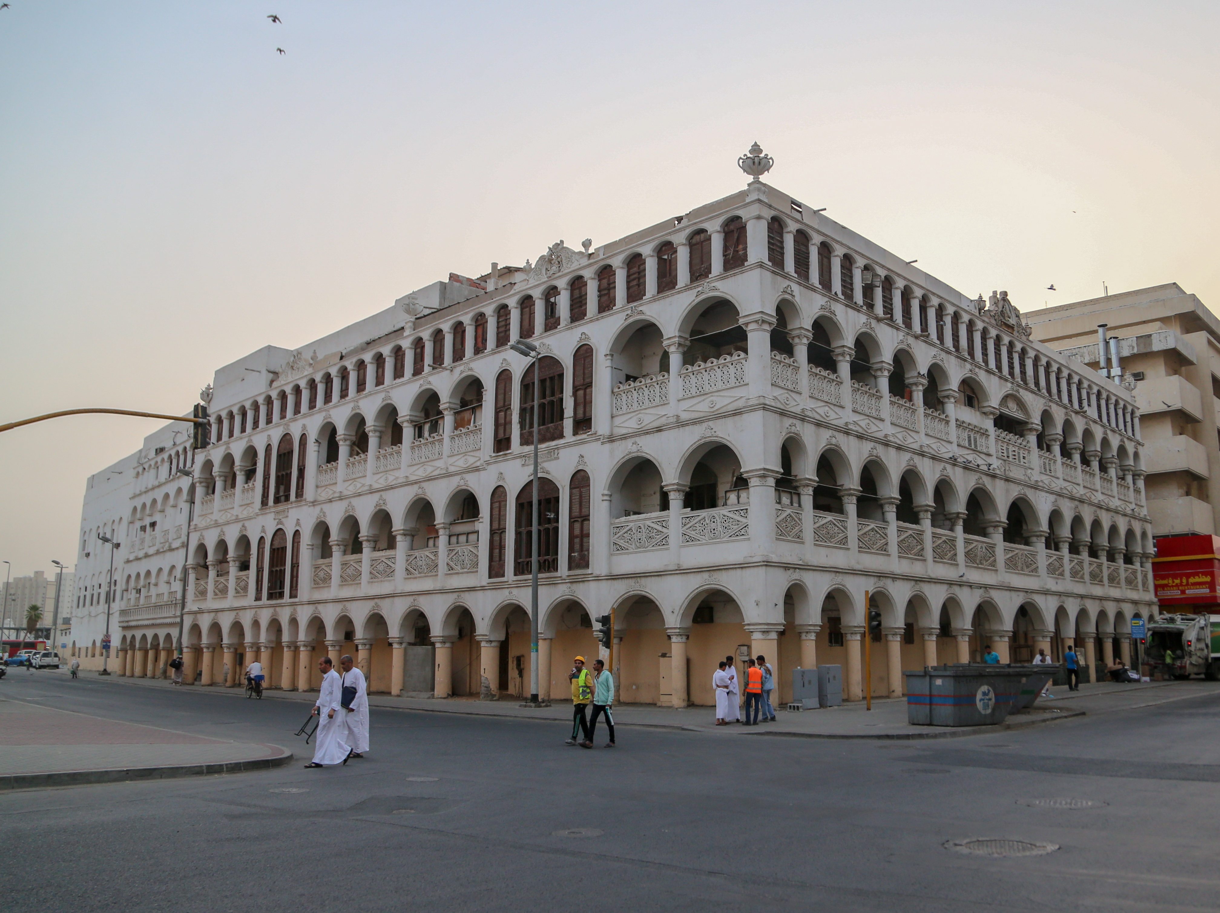 قصر بن سليمان في جرول بمكة